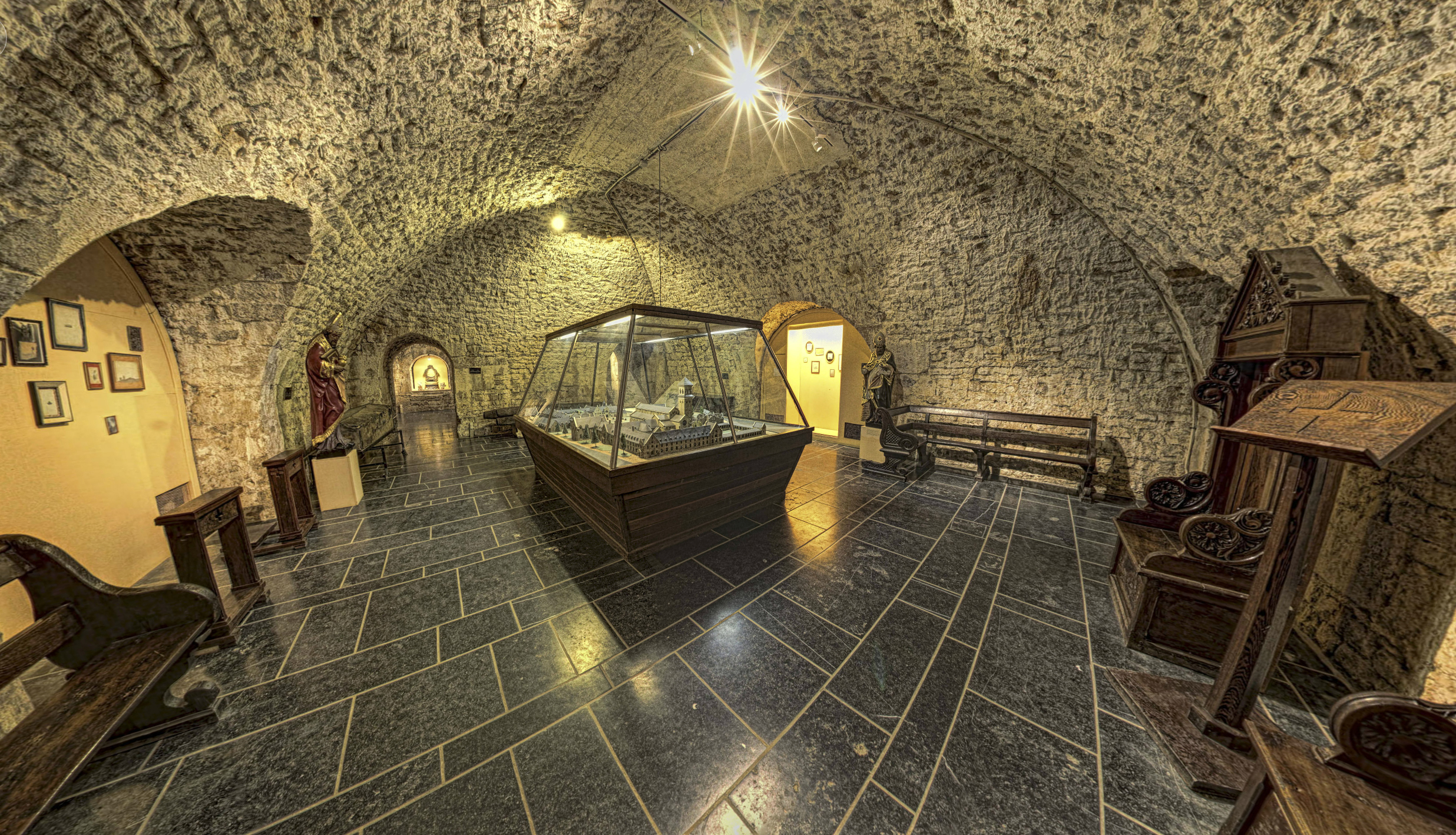 Musée D'orval